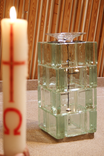 Dopfunten är tillverkad av svagt gröntonat byggnadsglas av Berlings glas i Halmstad